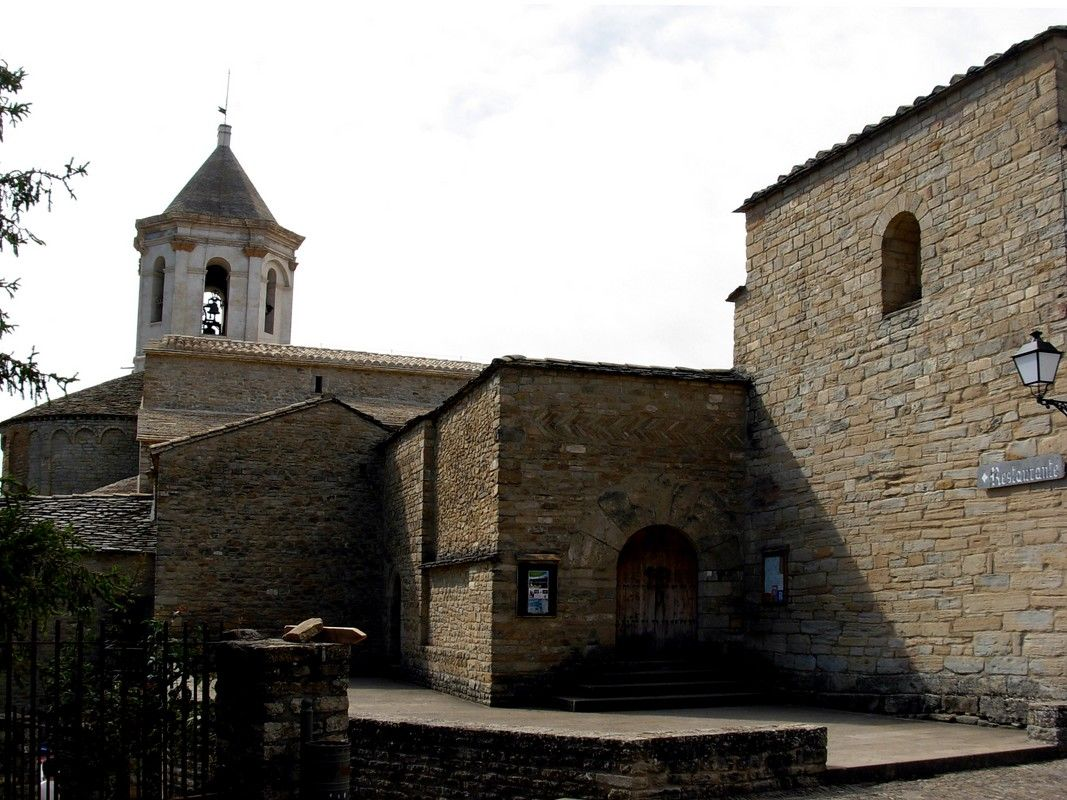 Roda d'Isàbena